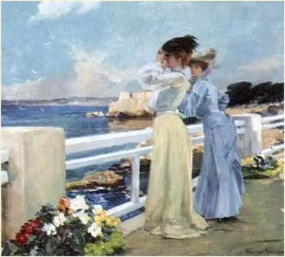 « Les mouettes », peinture